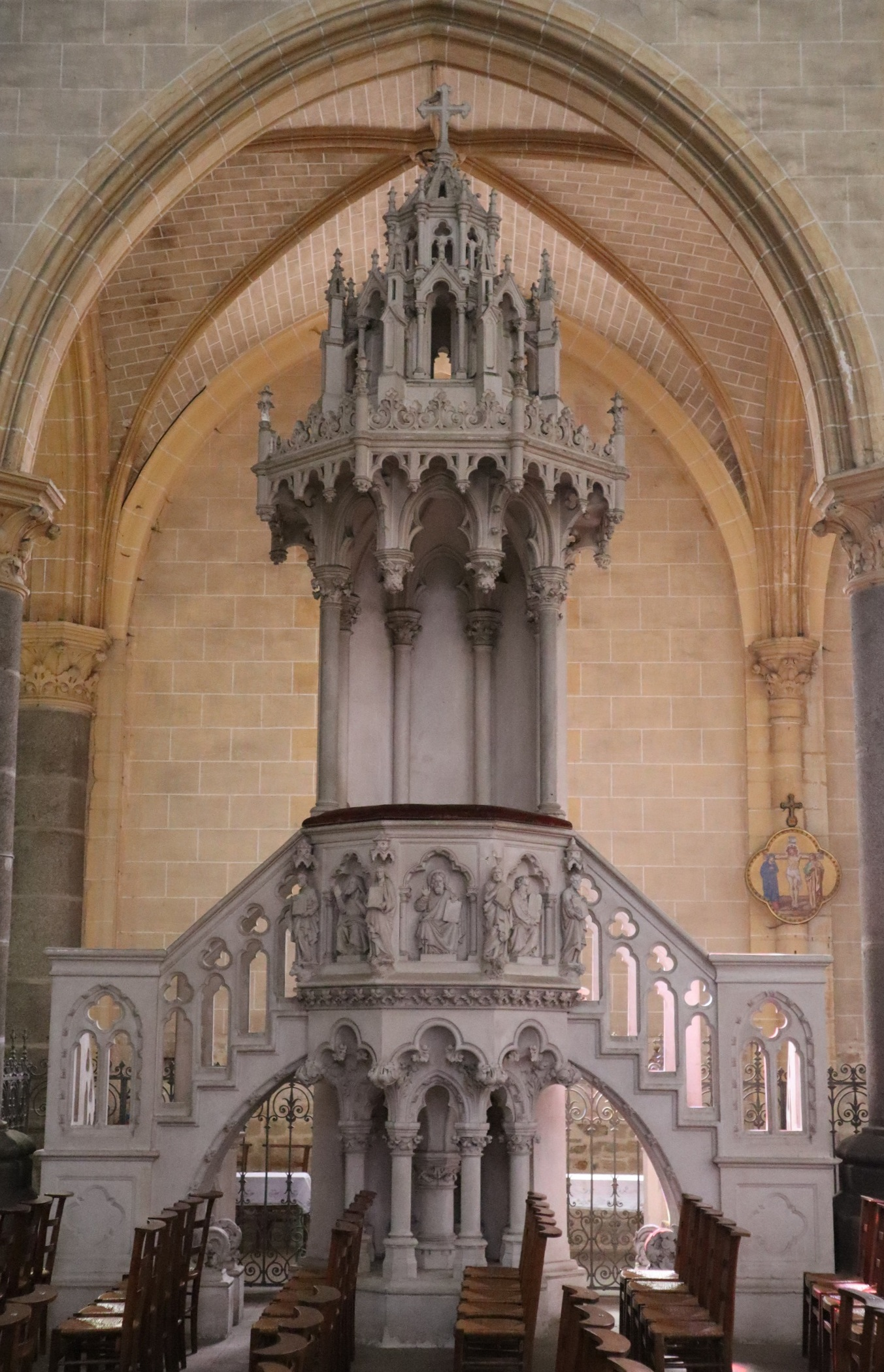 Chaire de l'église Saint-Pierre de Martigné-Ferchaud (35).